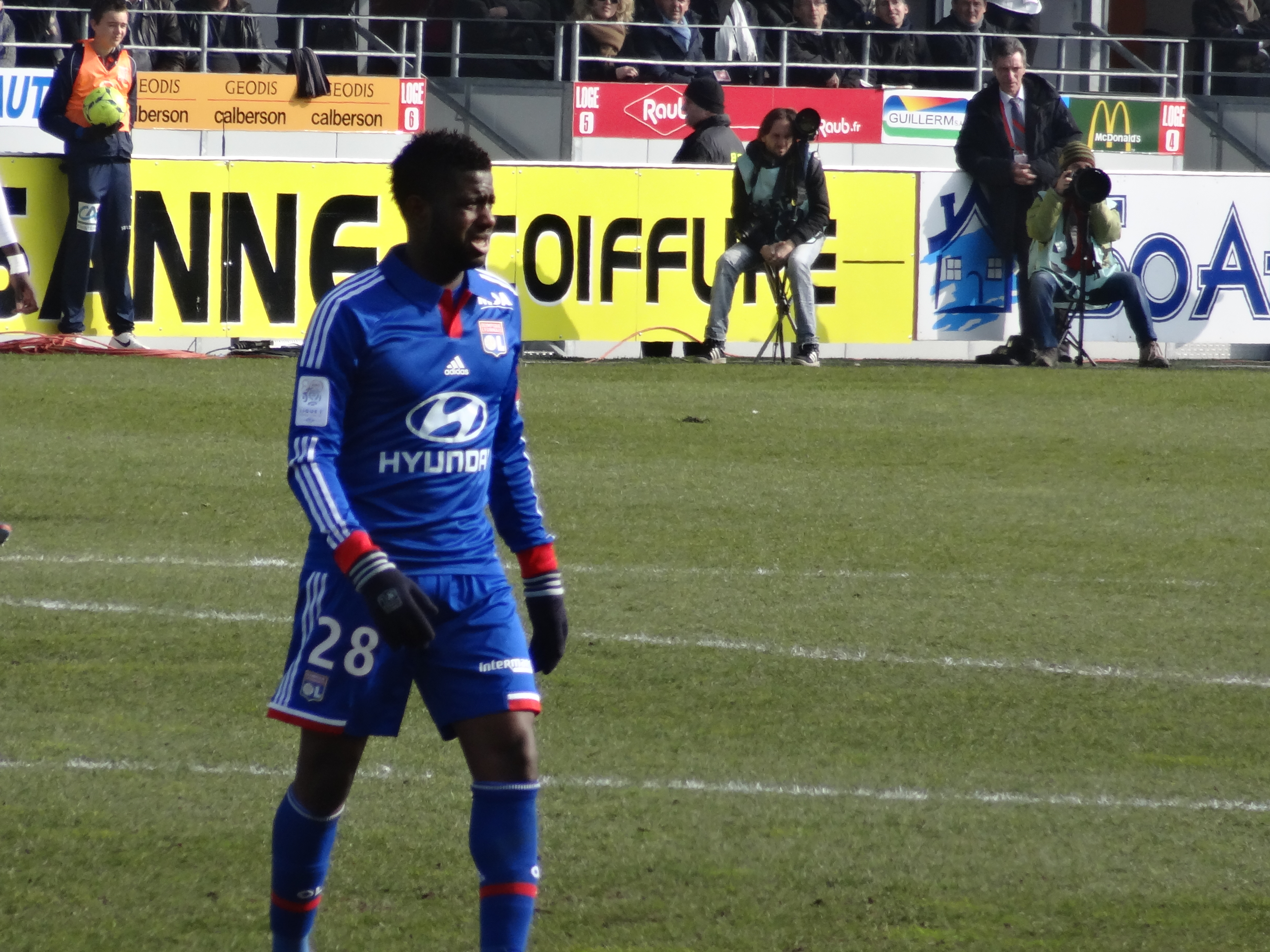 Match de football (Ligue 1) entre le Stade brestois 29 et l'Olympique lyonnais, le 3 mars 2013